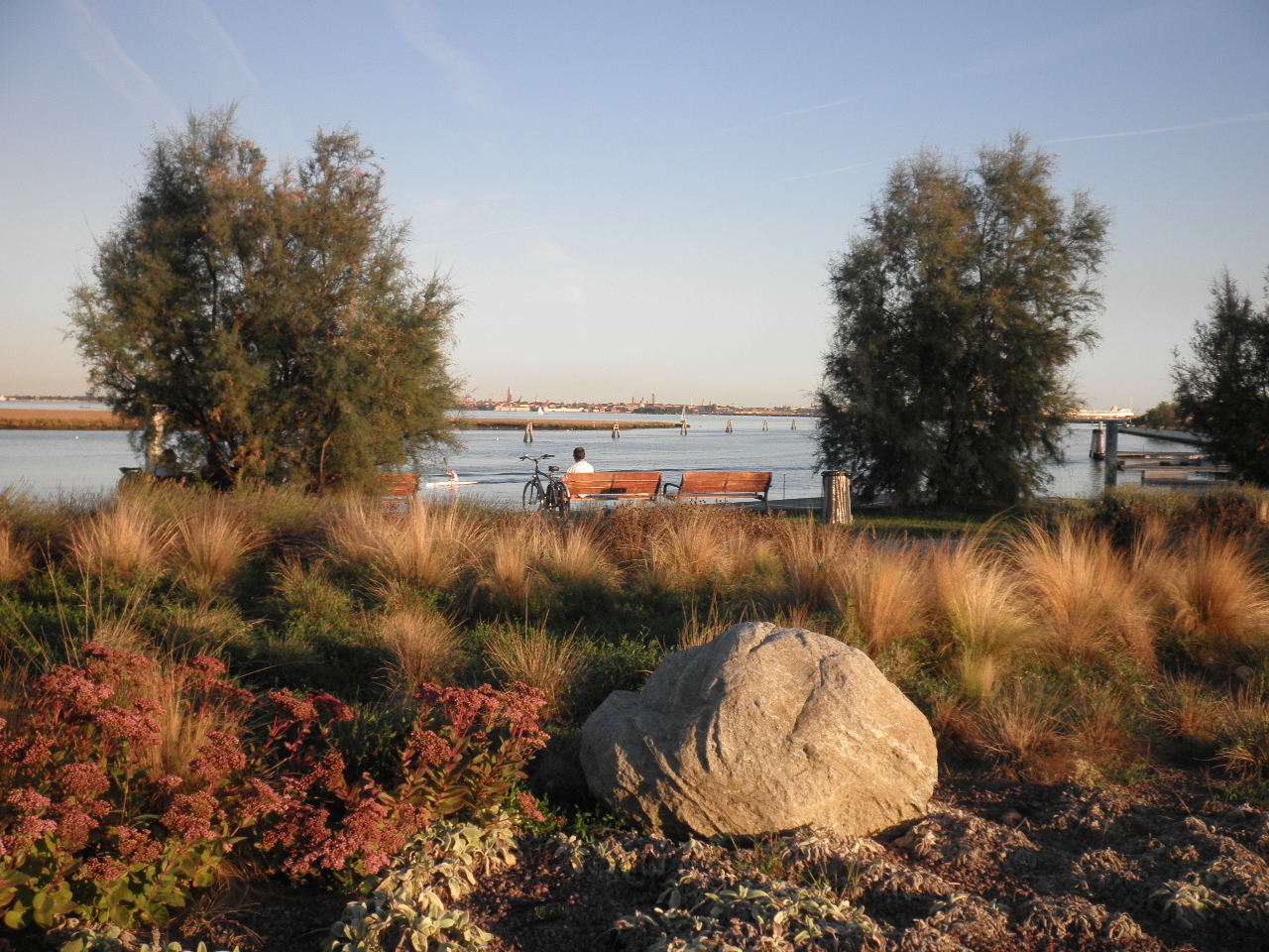 Příroda v Mestre, místní části Benátek, Itálie